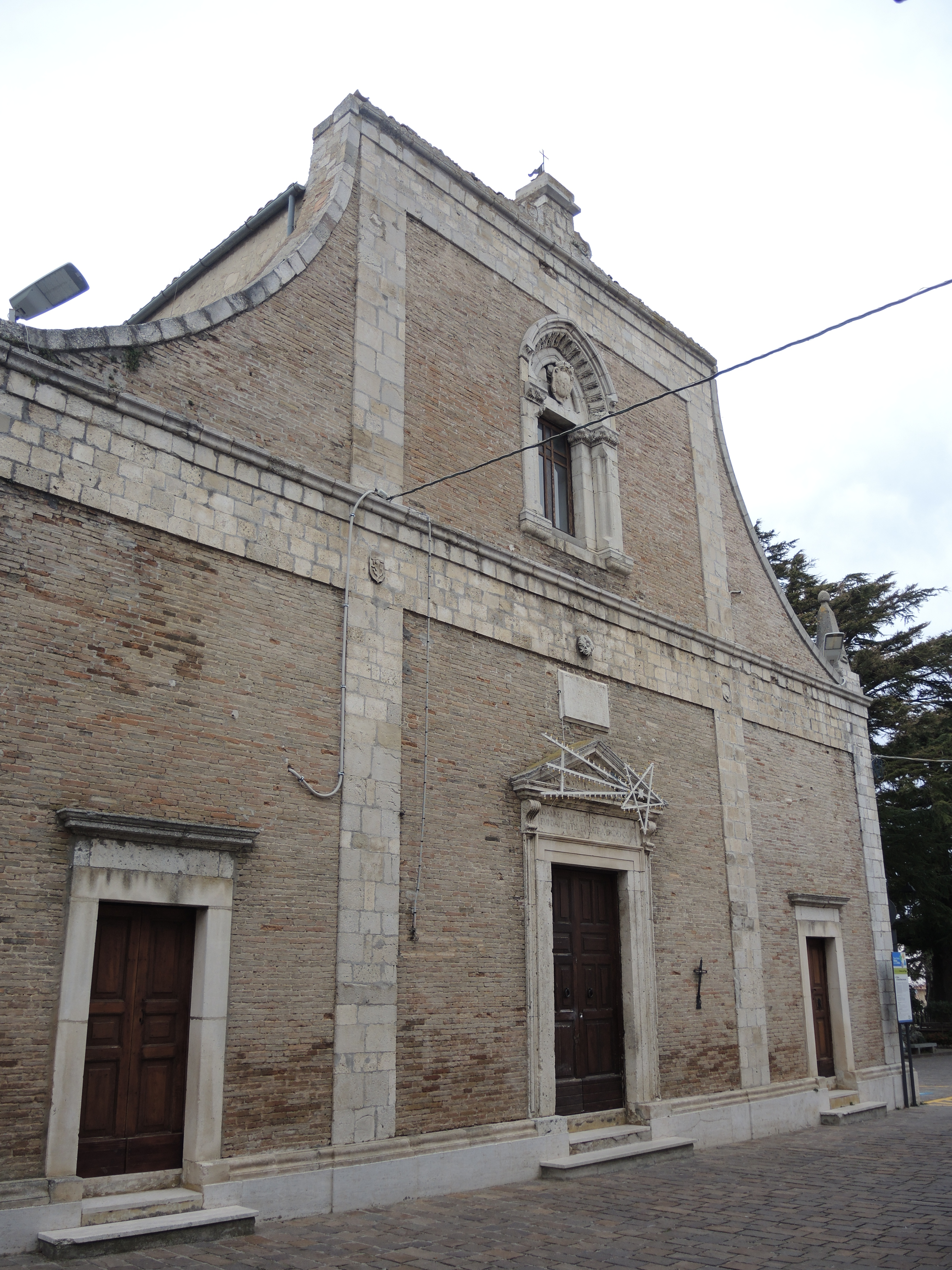 Celenza sul Trigno: Chiesa di Santa Maria Assunta